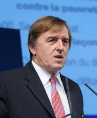 Le député Yvan Lachaud lors du congrès du Nouvea-Centre à Issy les Moulineaux le 29 Novembre 2008